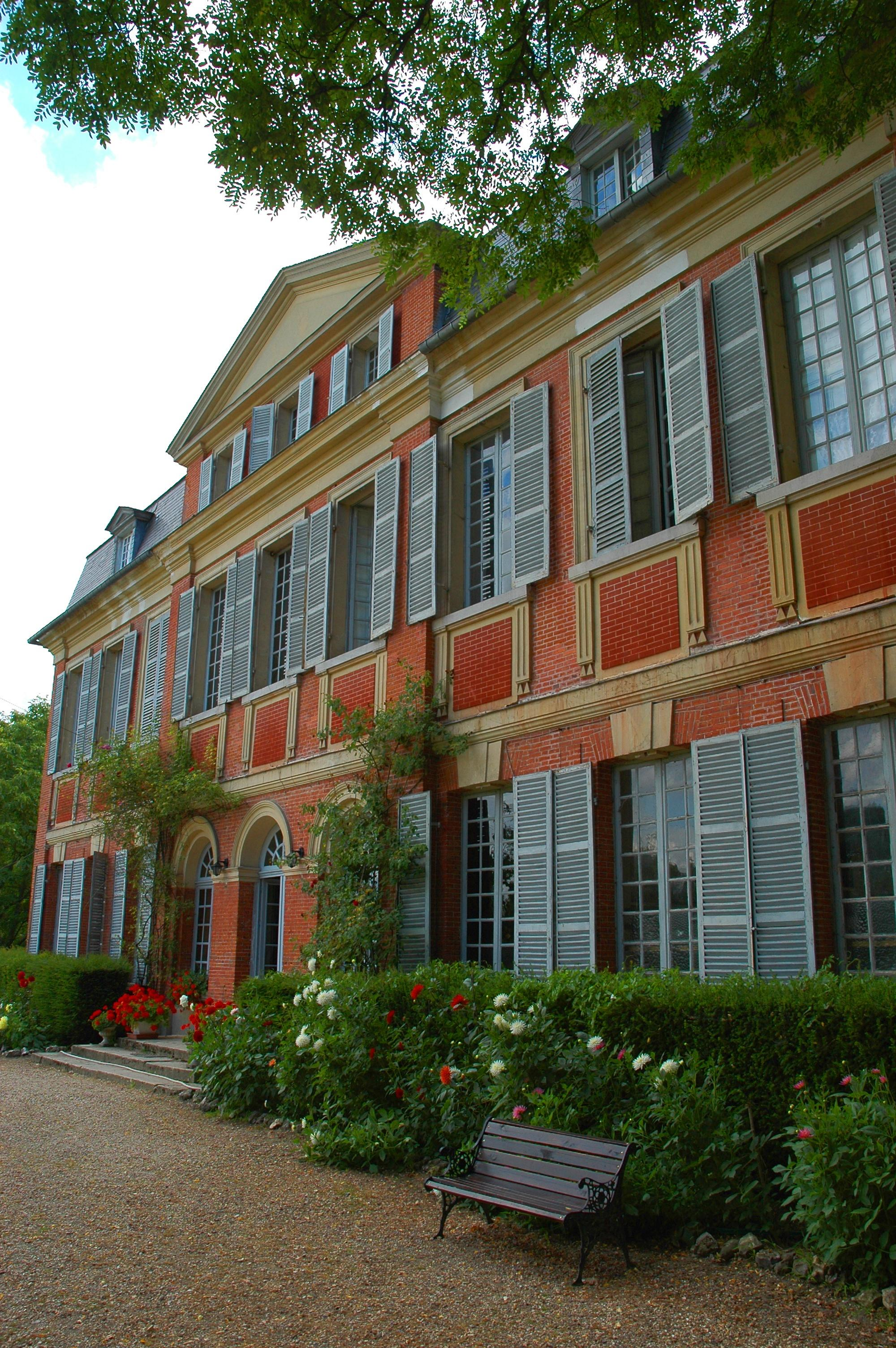 Леснинский монастырь (2005 г.), Франция, Провемон.